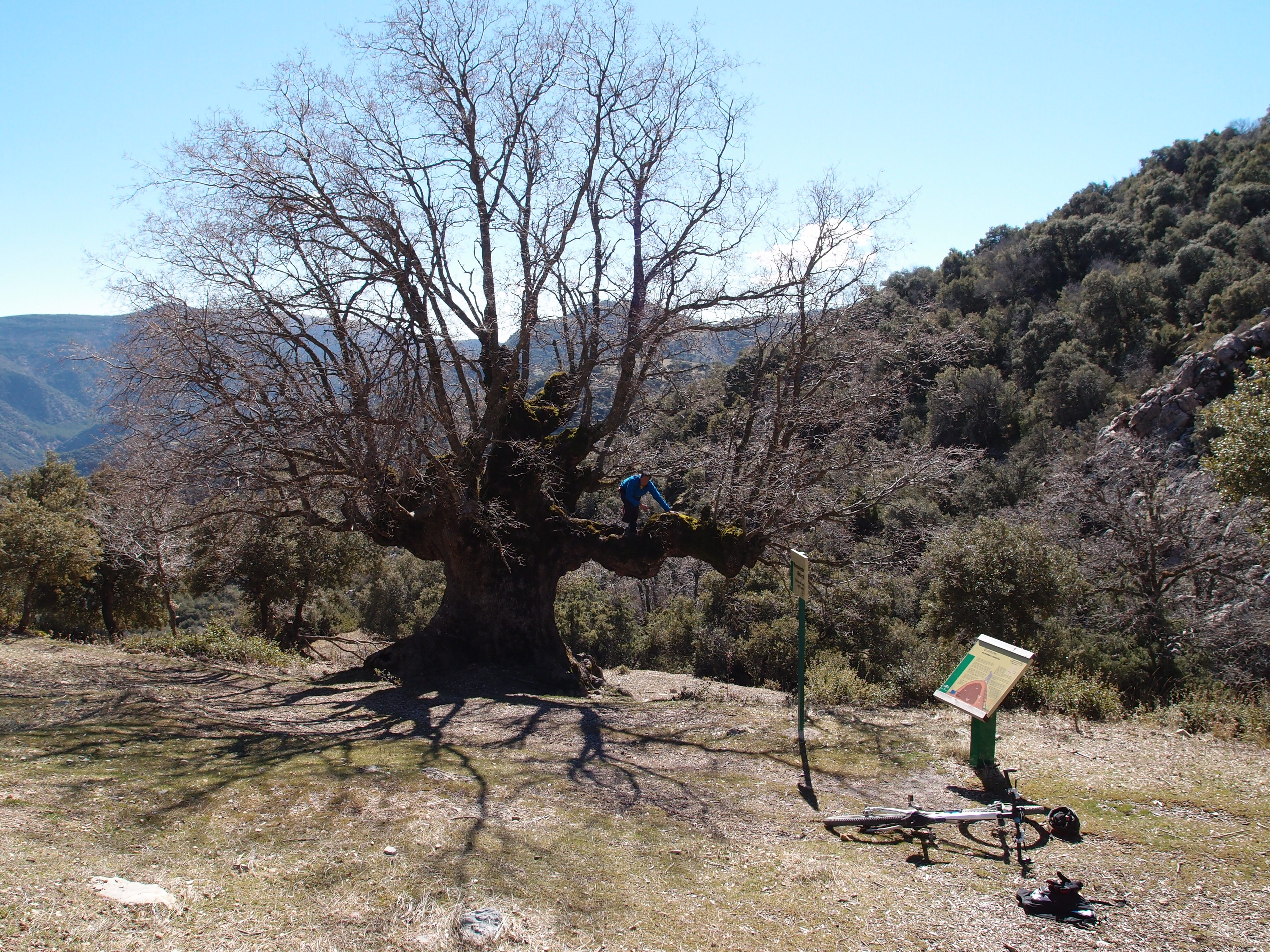 Vista del Quejigo del Amo